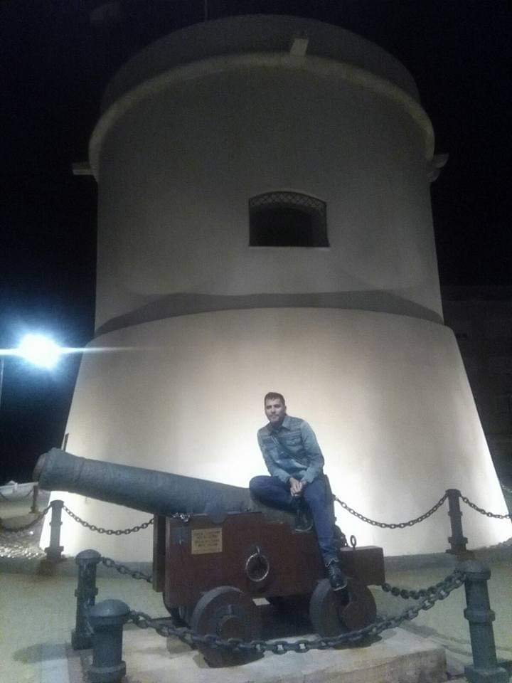 Torre de Balerma